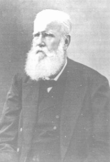 Fotografia de Dom Pedro II do Brasil, idoso.